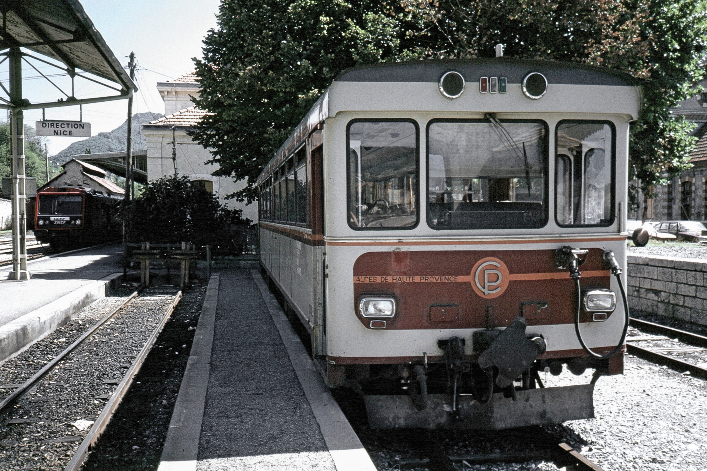 CP Schmalspur und SNCF Regelspur in Digne